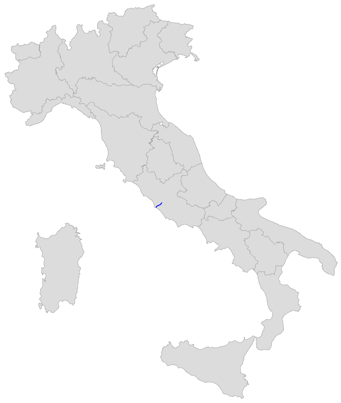 Percorso della SS 8 bis Via Ostiense